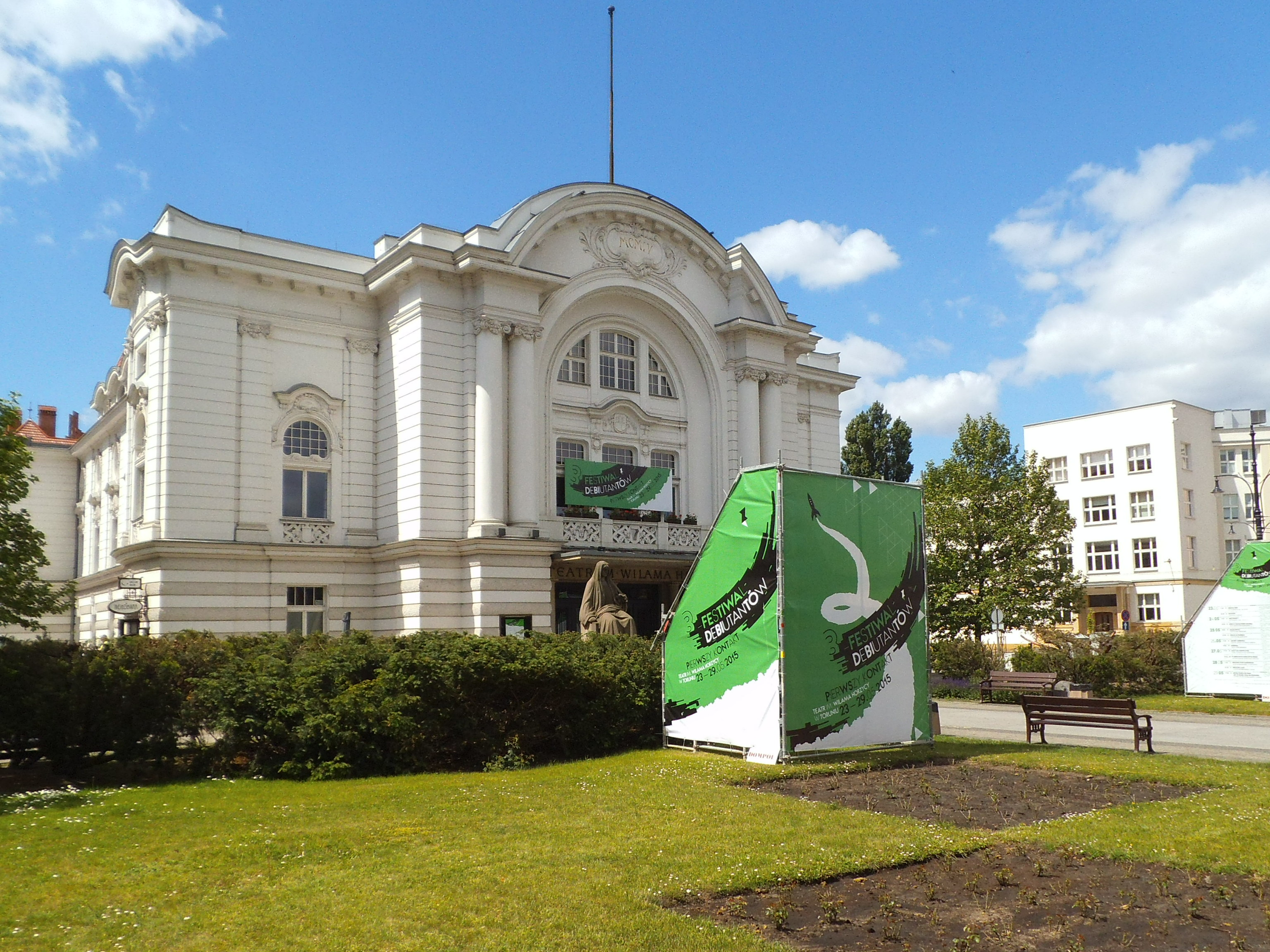 Festiwal Debiutantów "Pierwszy Kontakt" w Toruniu